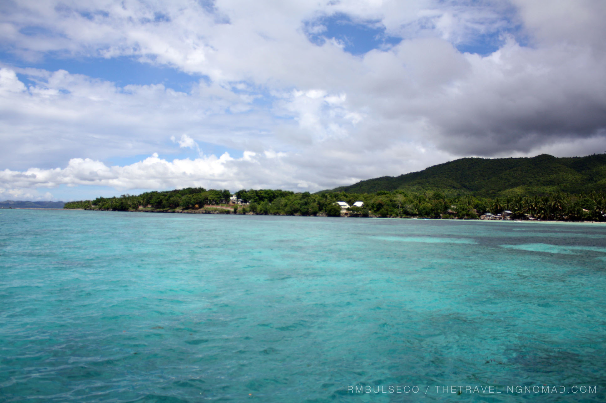 Dumaguete-Siquijor trip last March 2013.